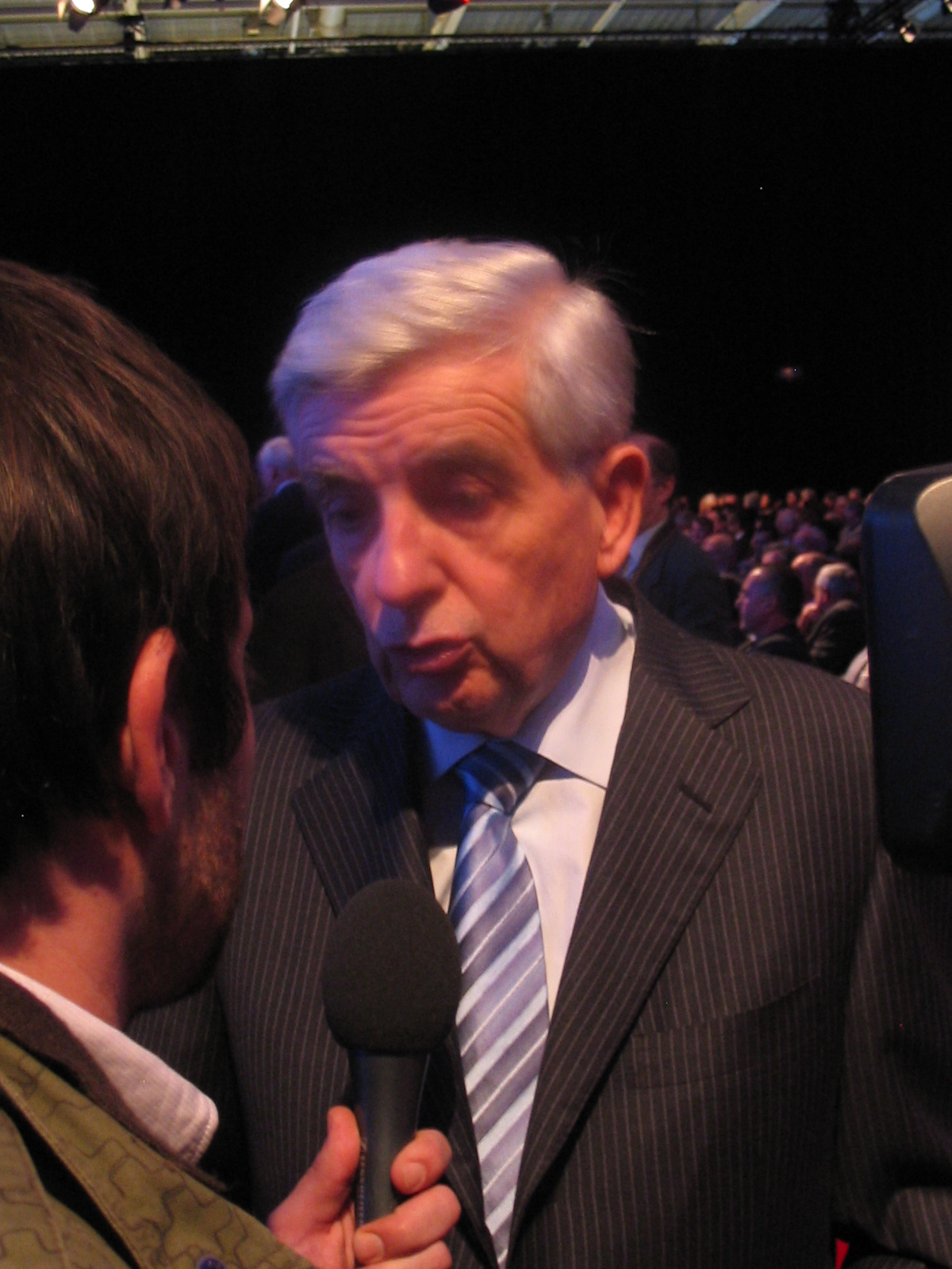 Jean-Pierre Chevènement au Congrès des Maires (novembre 2006). Je suis l'auteur de la photo.